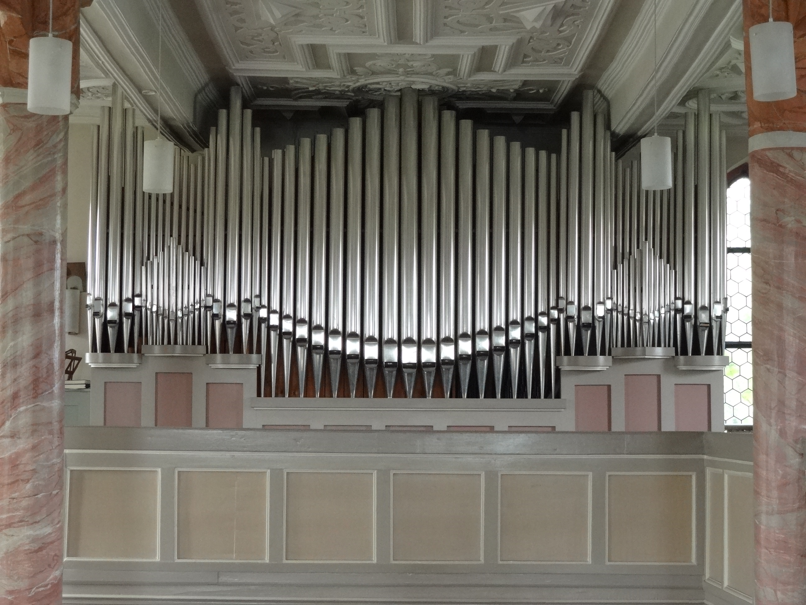 Evangelische Pfarrkirche (Nieder-Weisel)